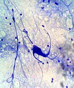 Neurone observé au microscope optique.